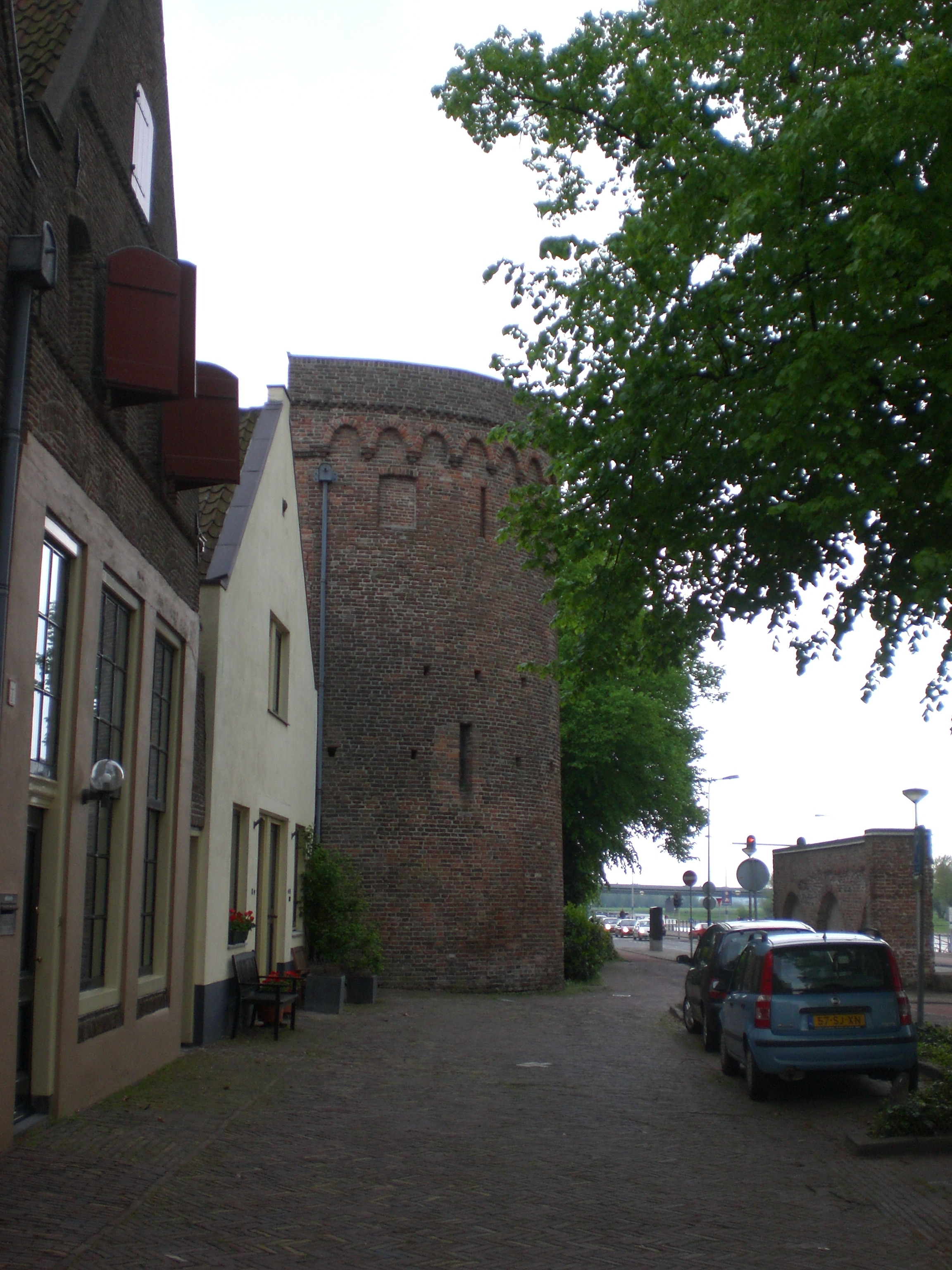 Bastion Deventer, Nederland (The Netherlands) Rijksmonument Nabij Achter de Muren Vispoort